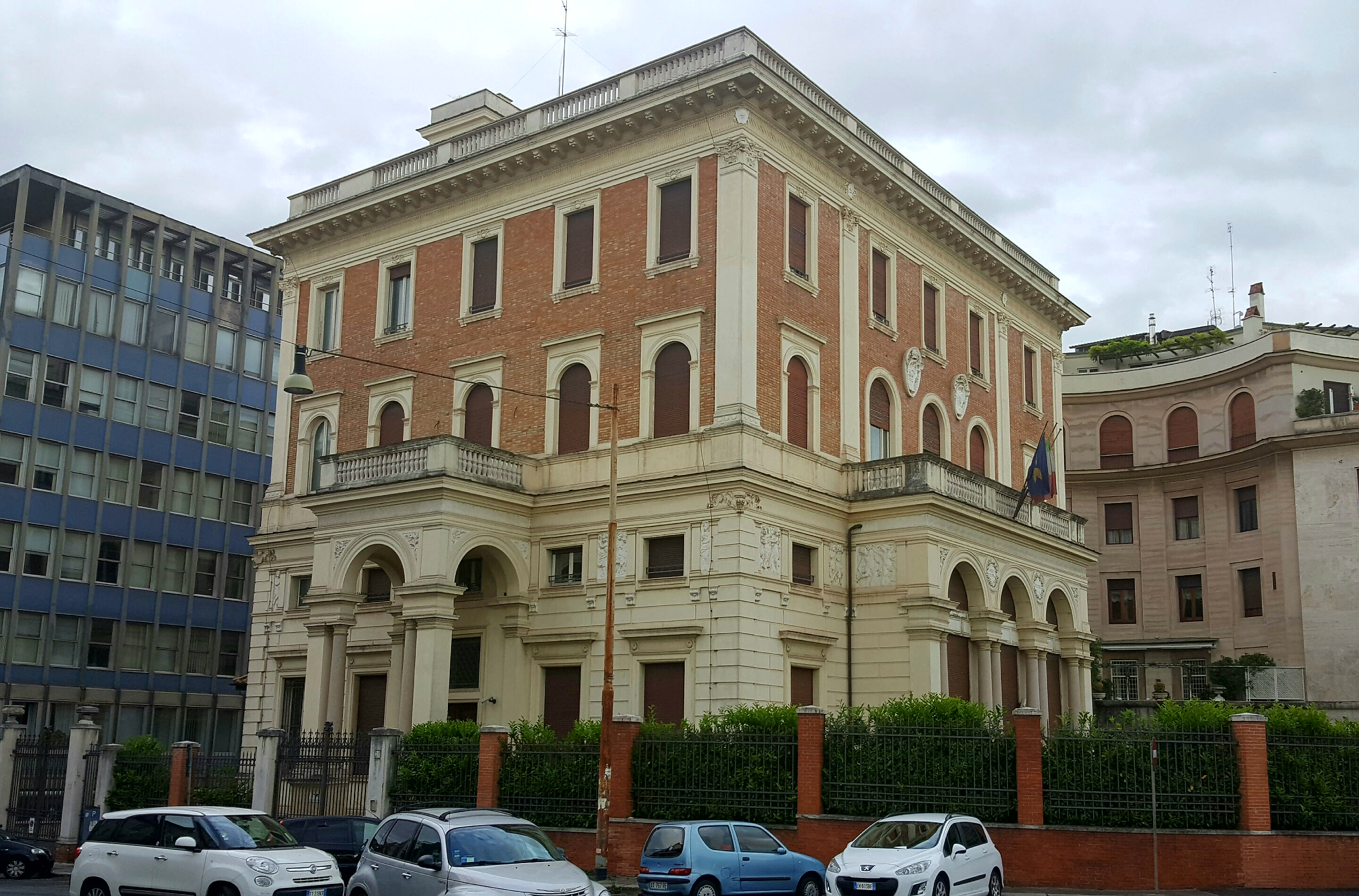 Sede Aero Club d'Italia a Roma a Via Cesare Beccaria 35.